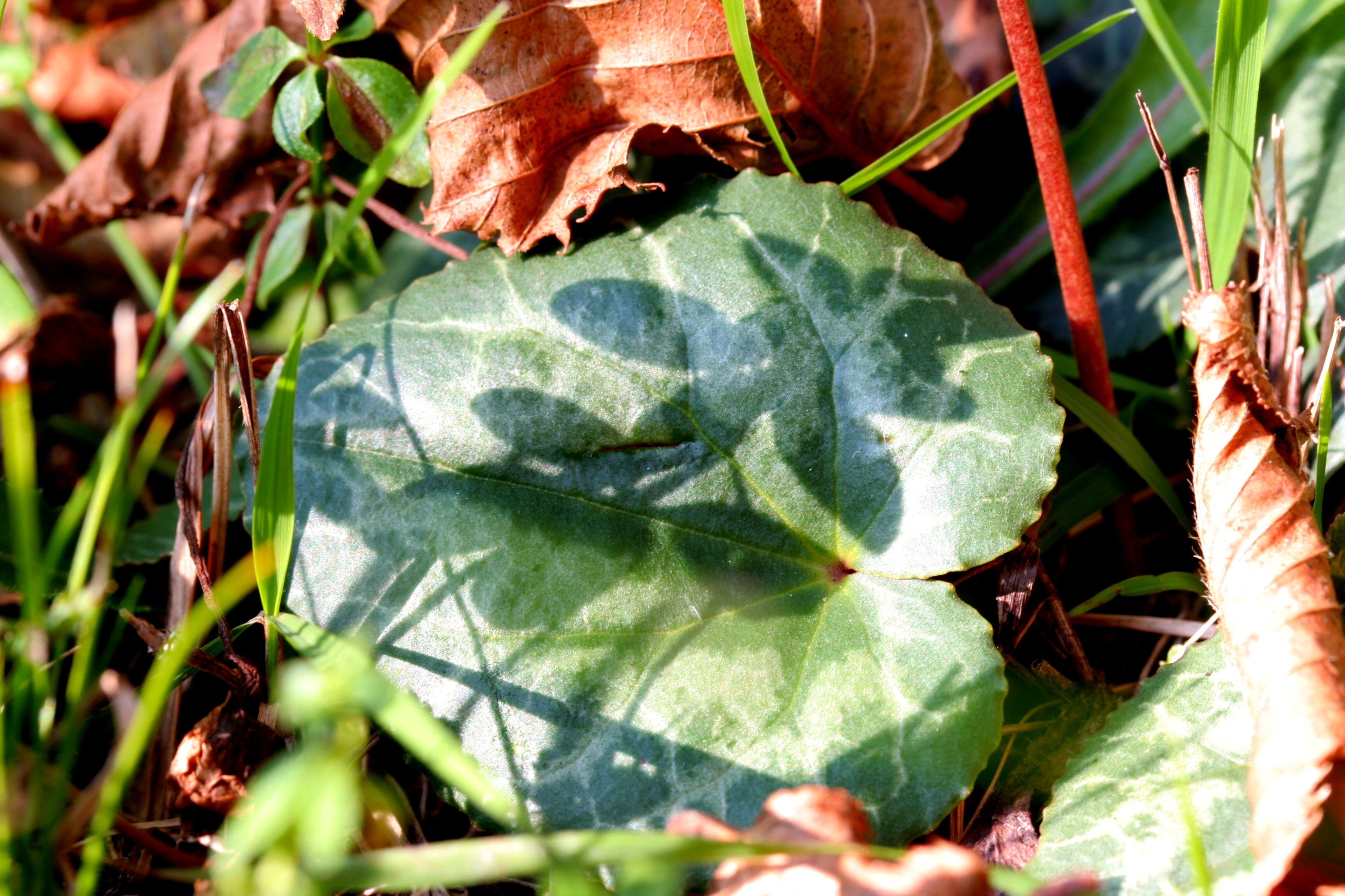 Cyclamen_purpurascens (Ciclamino delle Alpi) Località Barp (BL) 700 m s.l.m. 14/10/2007